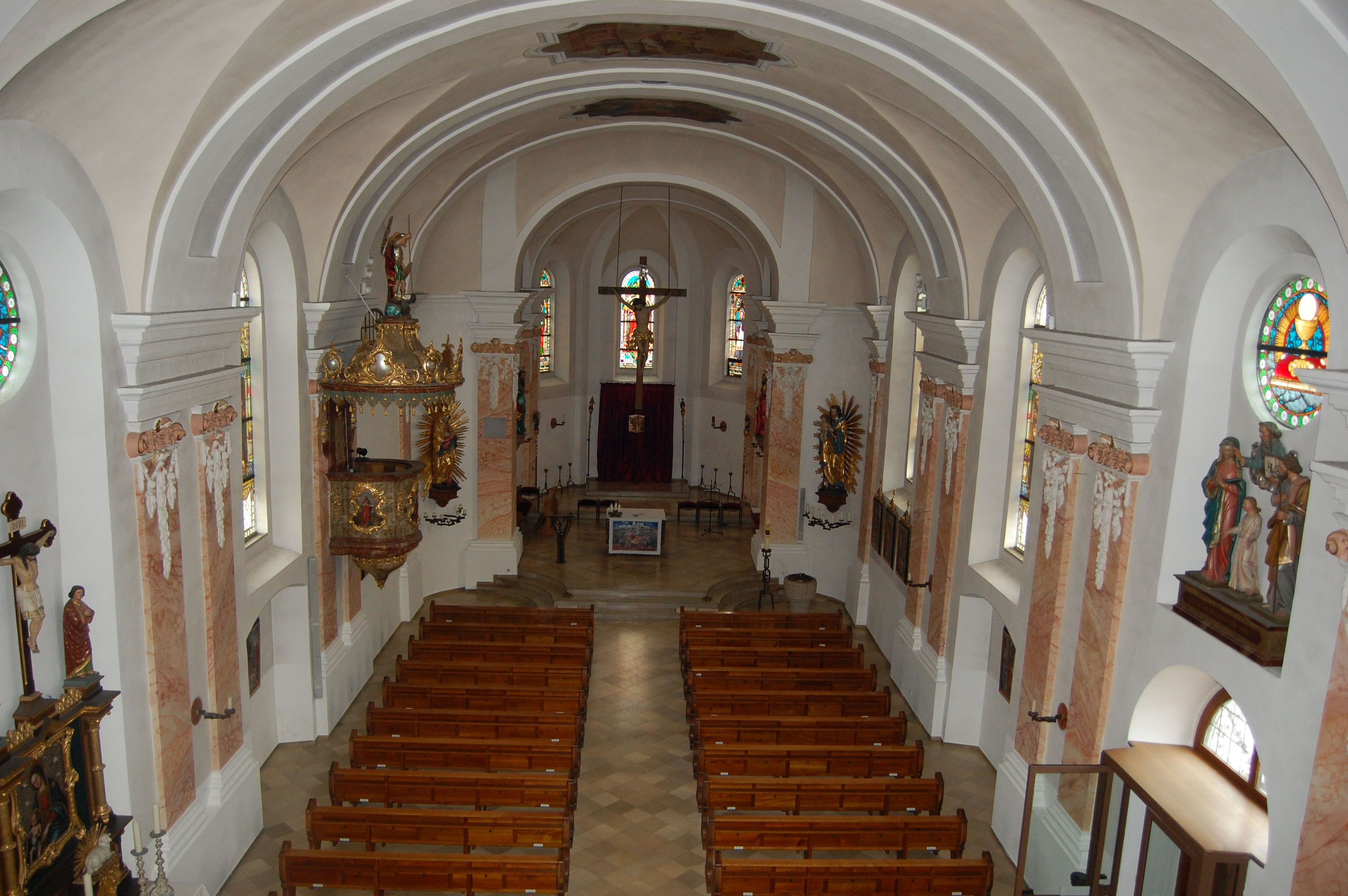 Tännesberg, Pfarrkirche St. Michael, Innenansicht (2011)